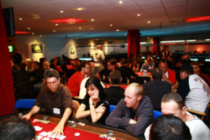 Finale championnat de France de poker FFDP 2008